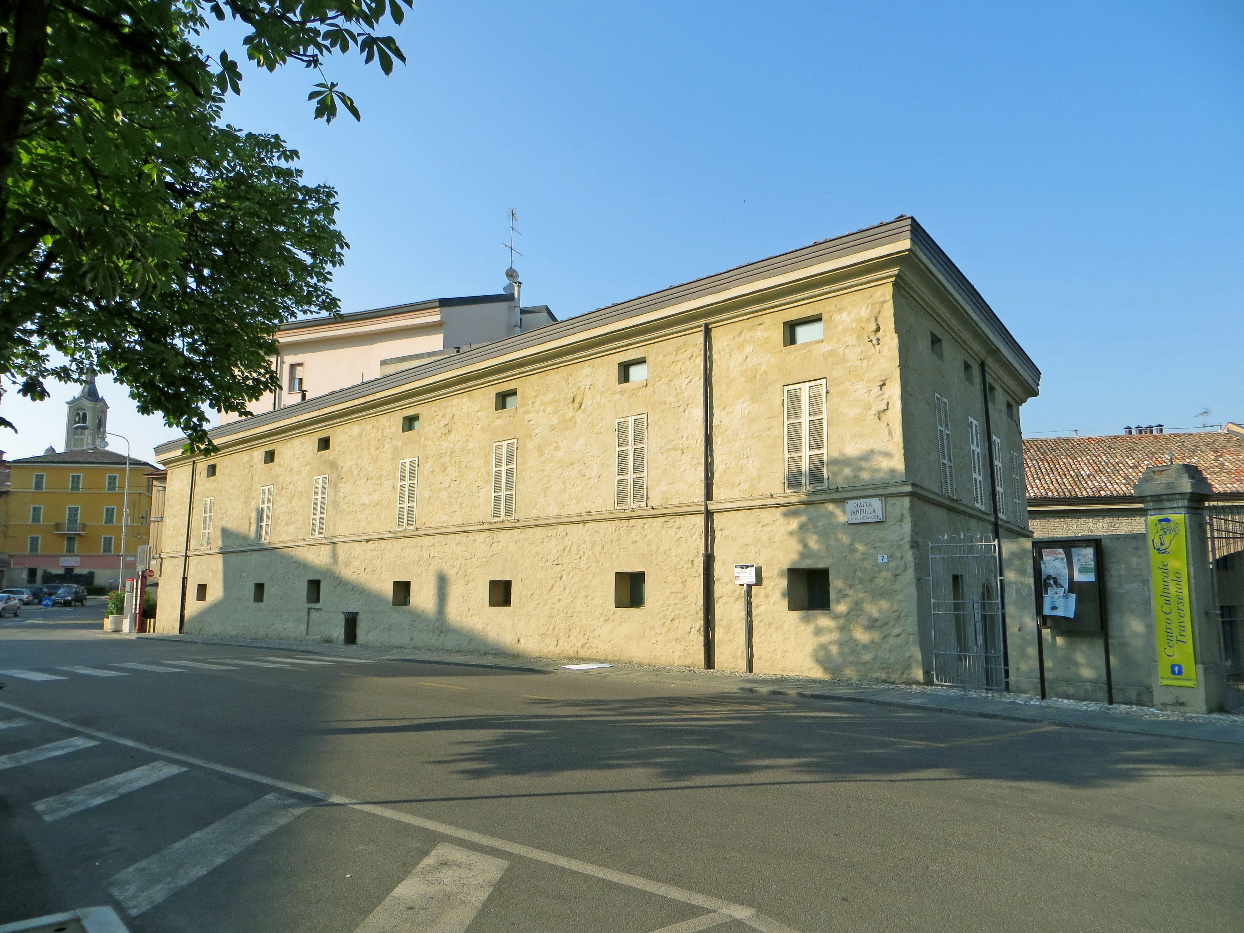 La Corte (Traversetolo) - facciata su piazza Fanfulla